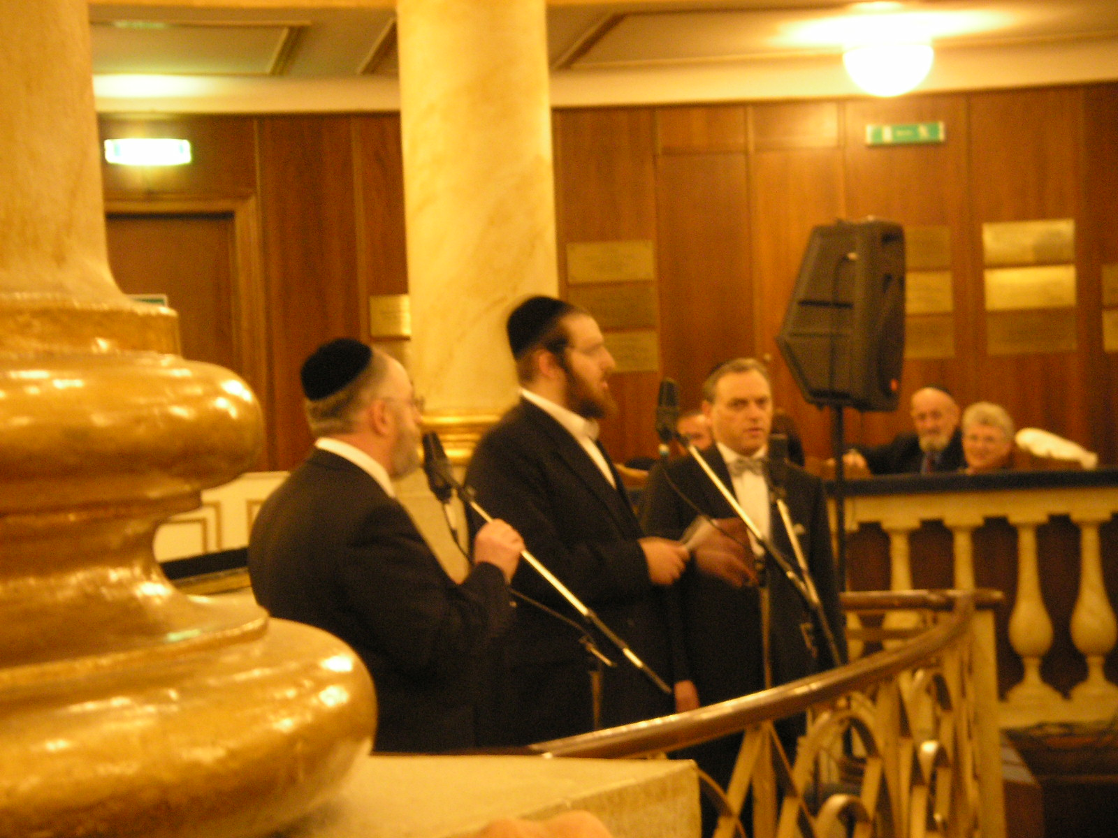 Kantorenkonzert in the Vienna Stadttempel.